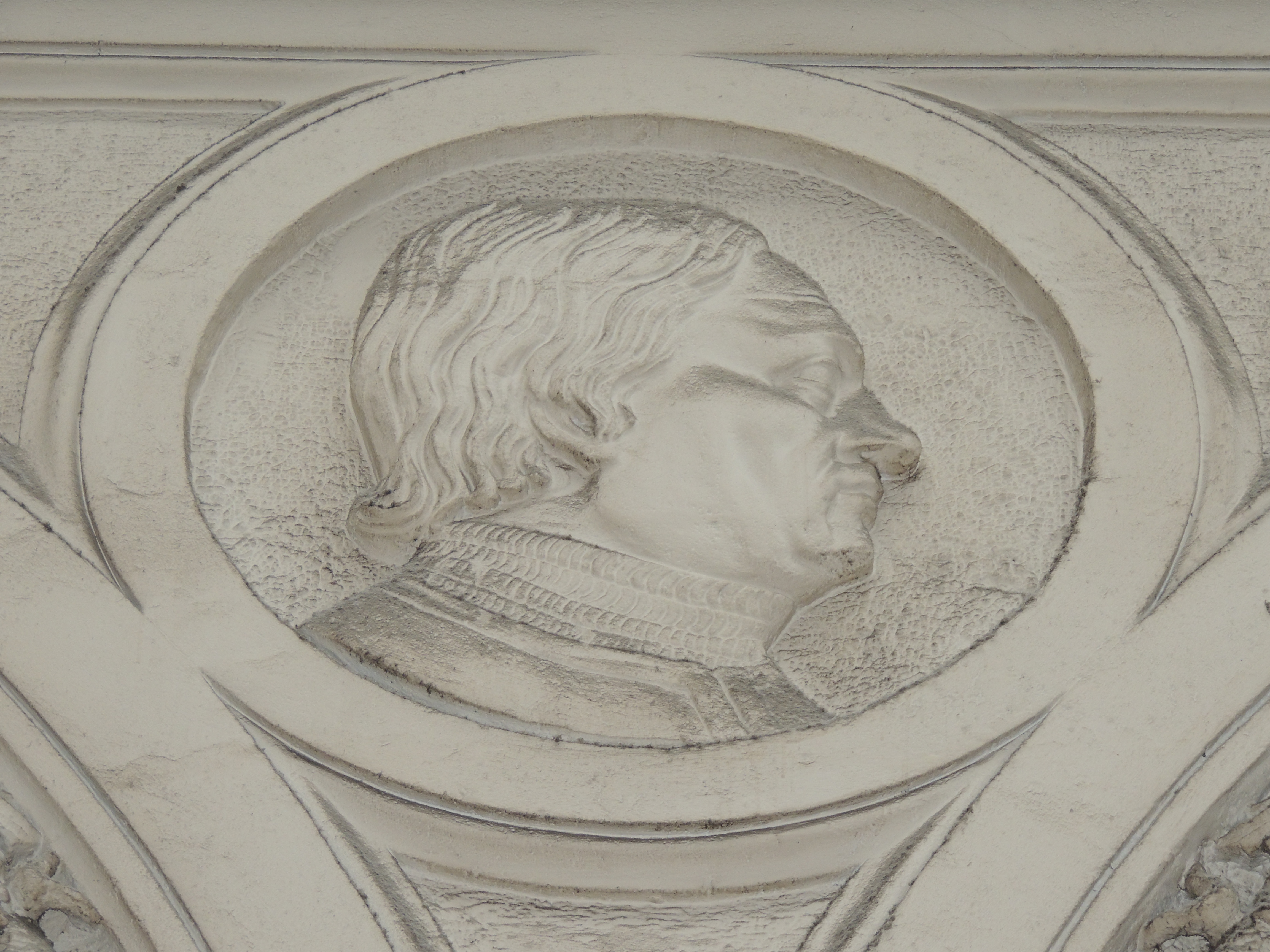 Passage Pommeraye, Nantes, France - Médaillon de la galerie Santeuil (côté ouest, le quatrième en partant du nord) - Olivier de Clisson